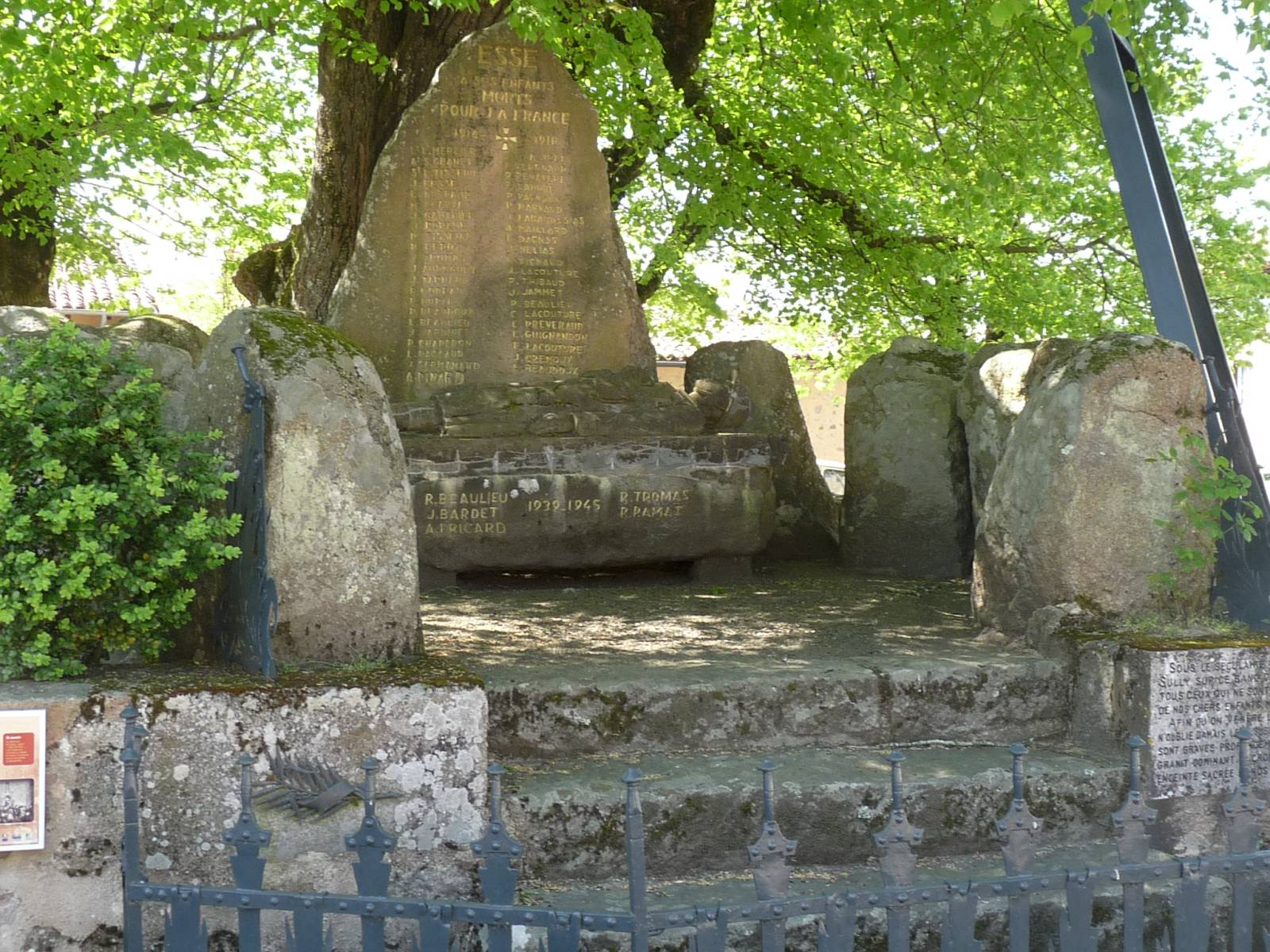 Monument aux morts d'Esse, Charente, France